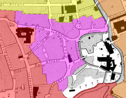 Der Sack um 1400 auf einer historischen Karte (Lila eingezeichnet)